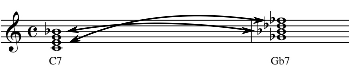 Tritone substitution